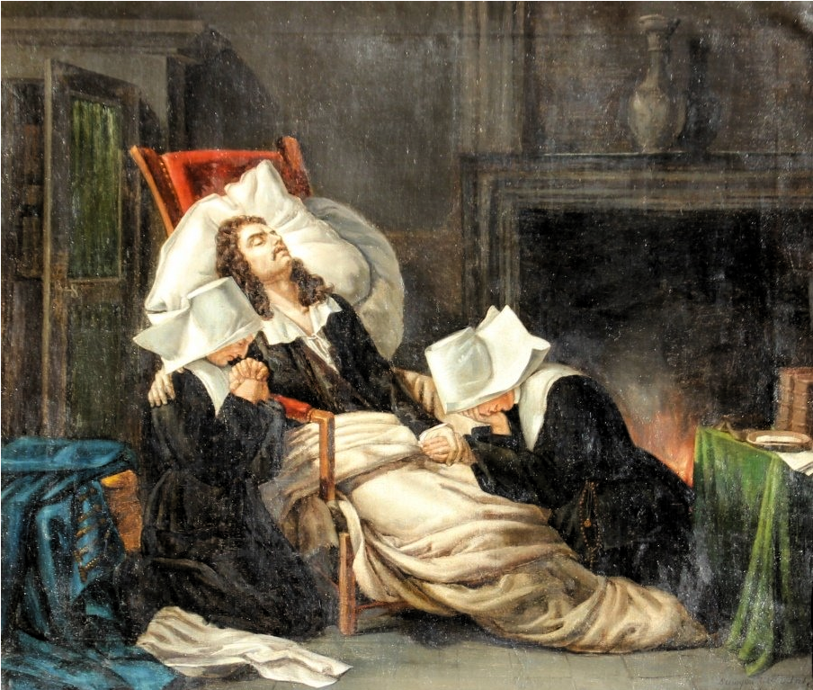 La Mort de Molière, d'après le tableau de Pierre-Antoine-Augustin Vafflard (1806)